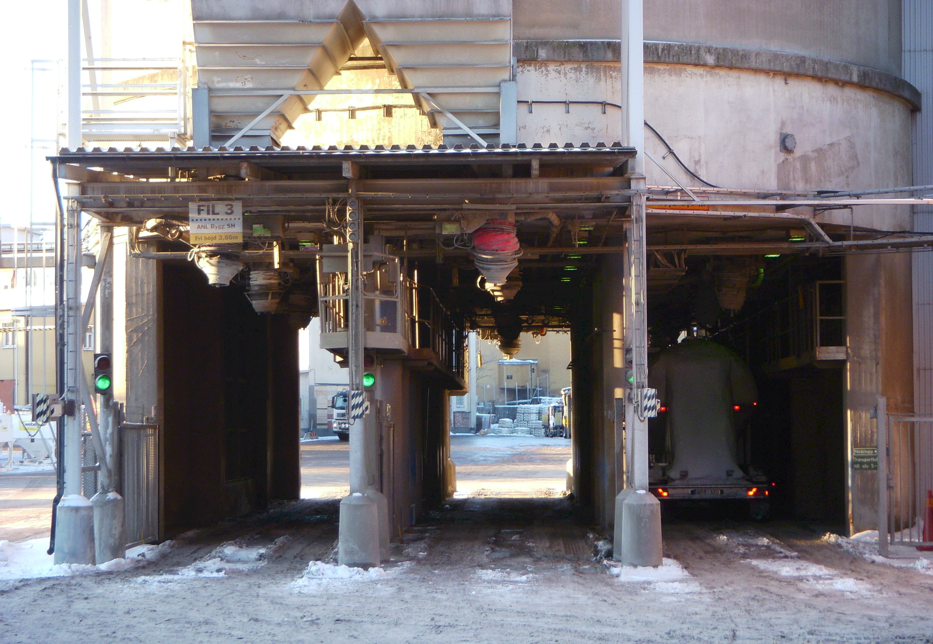 Cementa Liljeholmen, påfyllningsstation